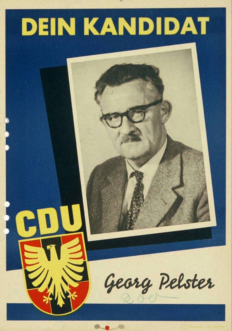 Dein Kandidat Abbildung: Porträtfoto Plakatart: Kandidaten-/Personenplakat mit Porträt Auftraggeber: CDU Westfalen Objekt-Signatur: 10-001: 736 Bestand: Plakate zu Bundestagswahlen (10-001) GliederungBestand10-18: Plakate zu Bundestagswahlen (10-001) » Die 3. Bundestagswahl am 15. September 1957 » CDU » Mit Porträtfoto Lizenz: KAS/ACDP 10-001: 736 CC-BY-SA 3.0 DE